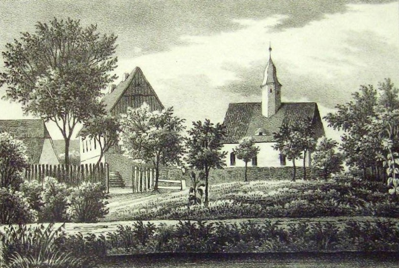 Stahlstich der Wilschdorfer Christophoruskirche um 1841